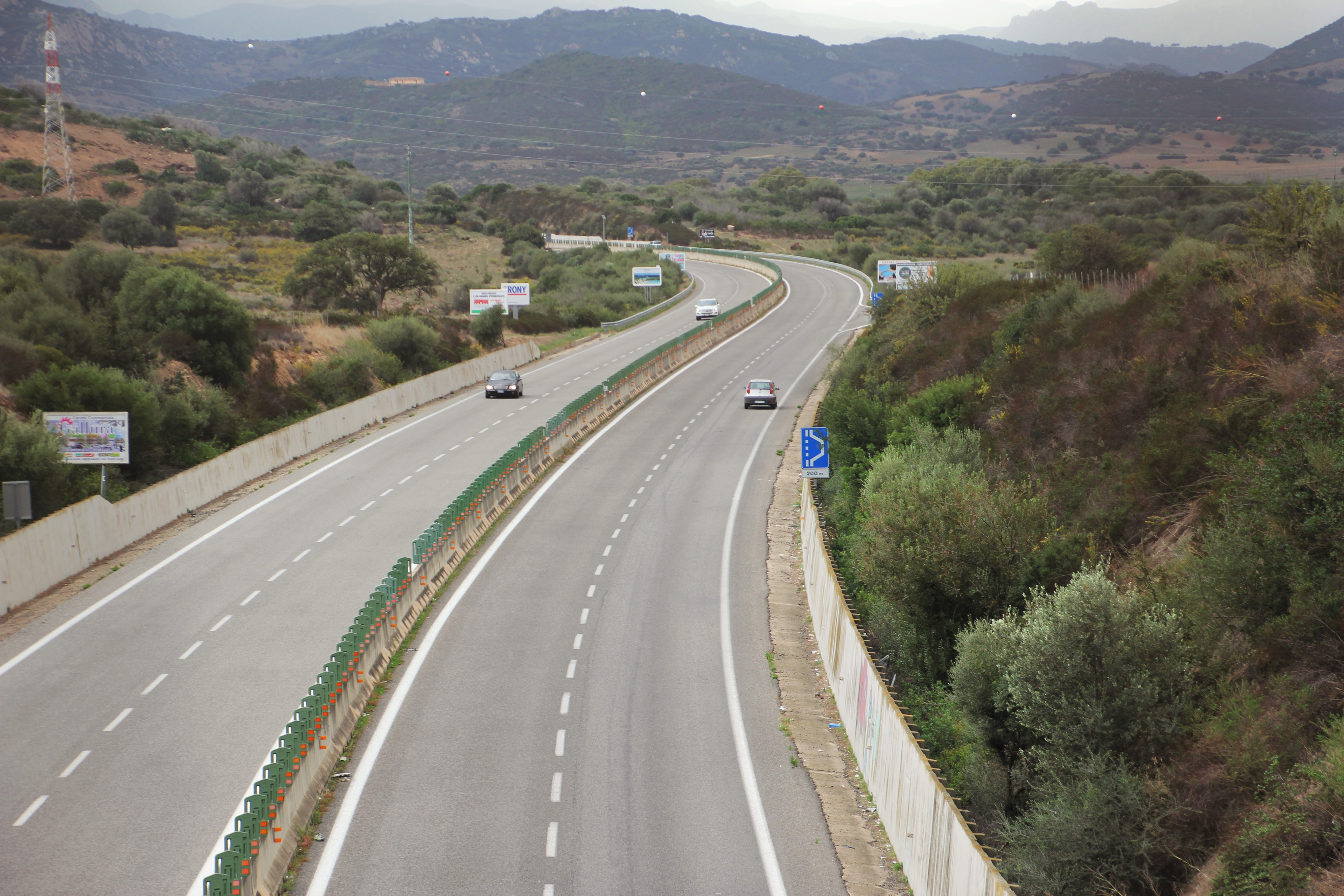 Olbia, SS 131 dcn